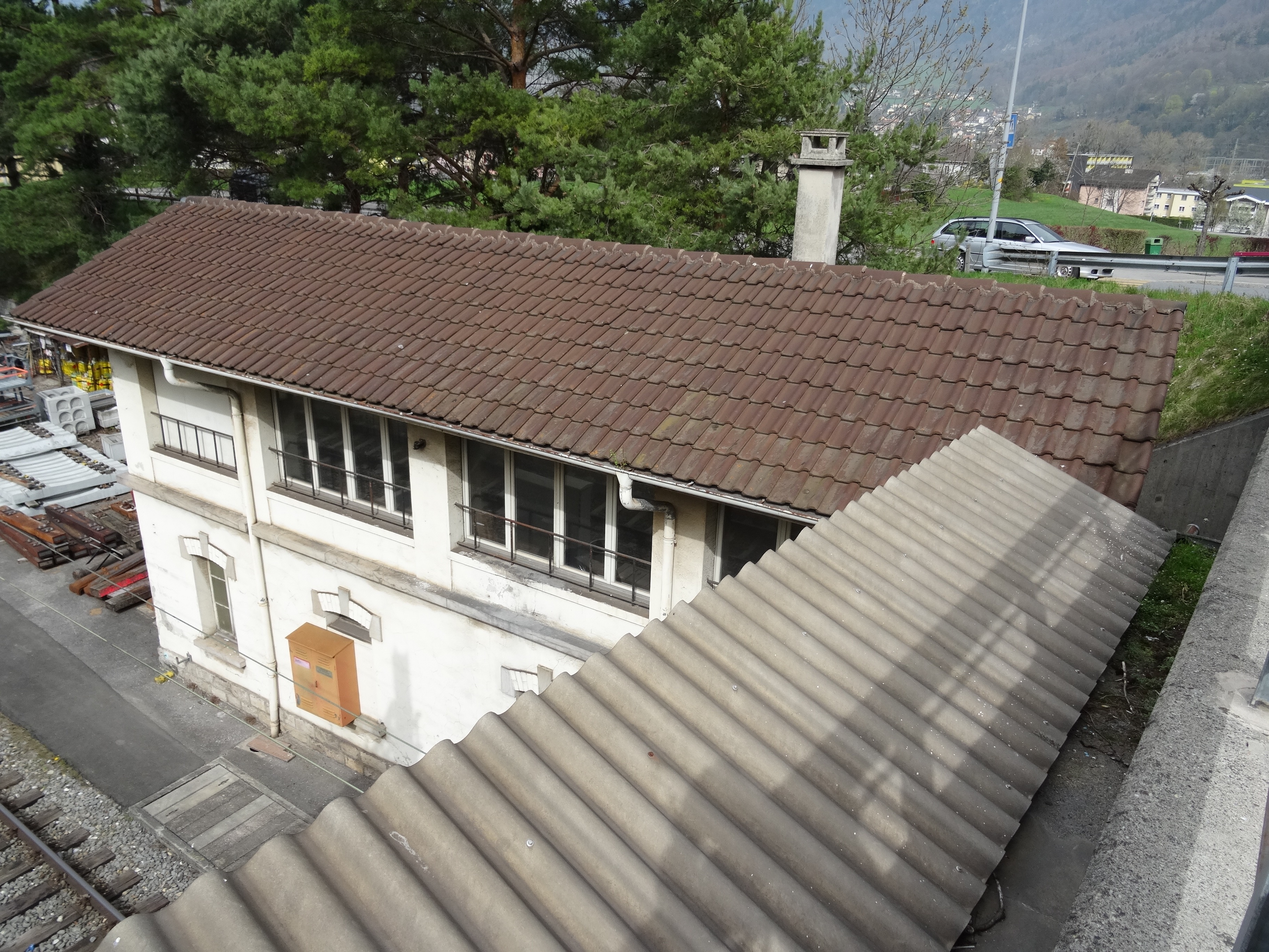 Le poste d'aiguillages actuellement inutilisé de la gare de St-Maurice juste avant le pont routier qui enjambe les installations.